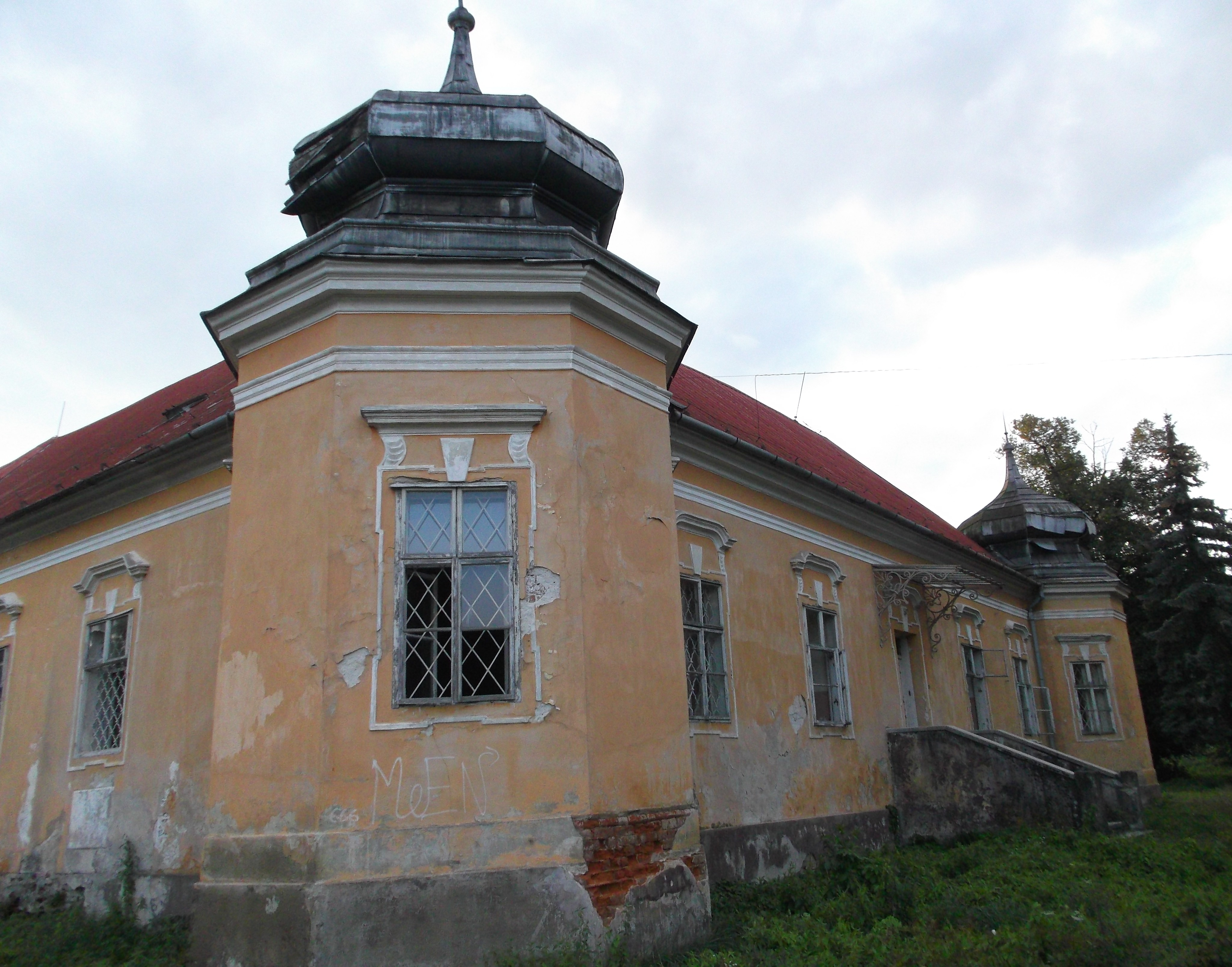 Kaštieľ